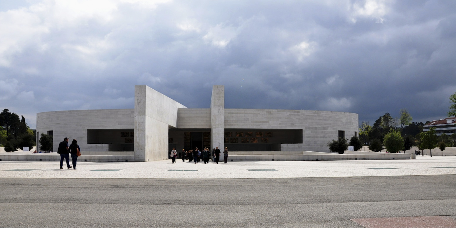 Igreja da Santissima Trindade - Kirche der Heiligsten Dreifaltigkeit